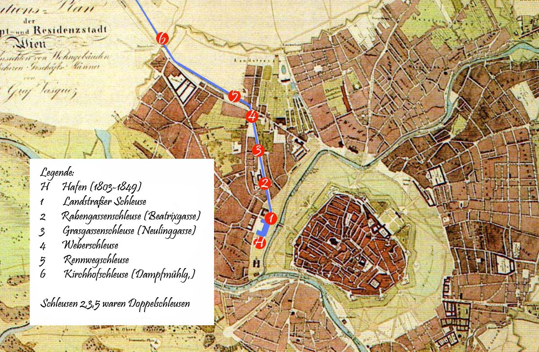 Kanal in Wien (Stich von Graf Vasquez aus dem Jahr 1832)